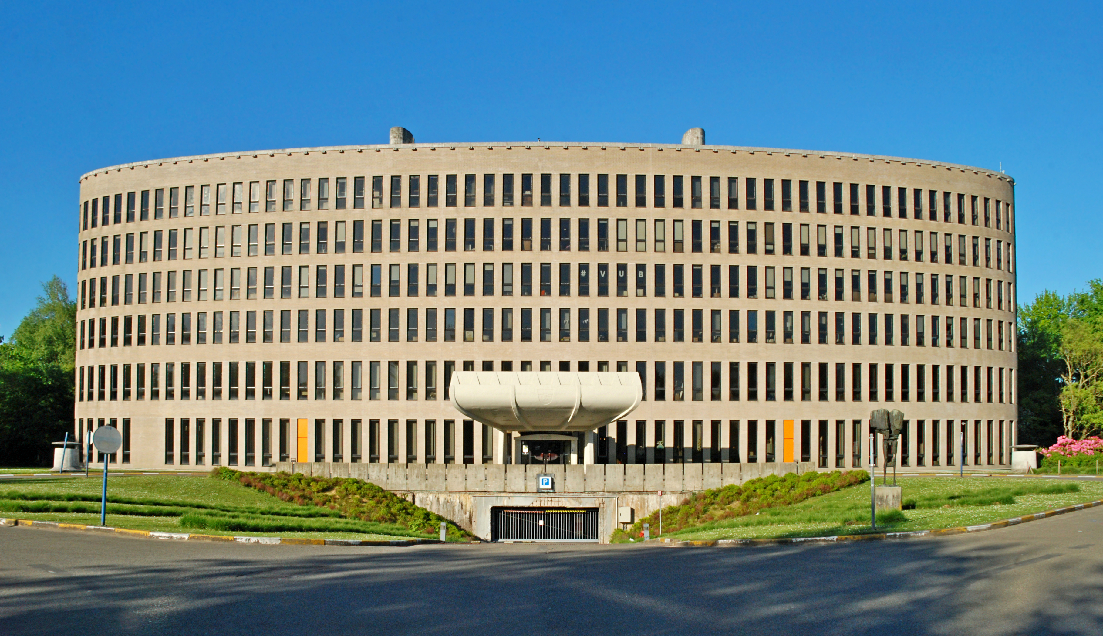 Belgique - Bruxelles - Vrije Universiteit Brussel (VUB) - Rectorat (Architecture fonctionnaliste - Renaat Braem - 1971-1978)